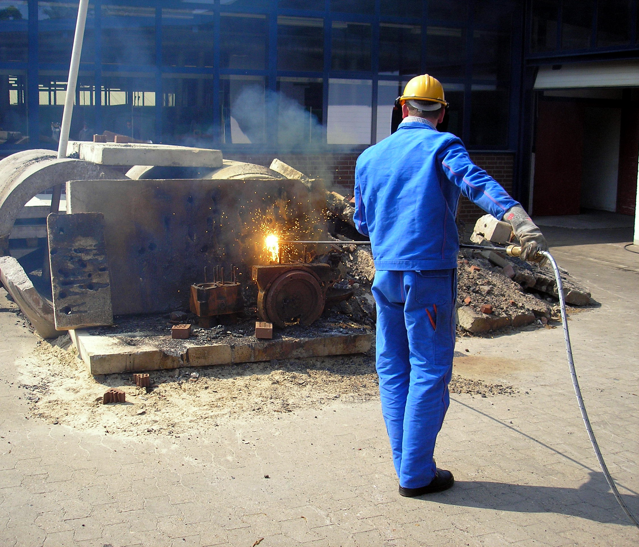 Sauerstoffkernlanze